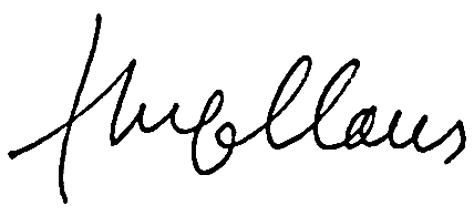 Handtekening van schrijver Hugo Claus